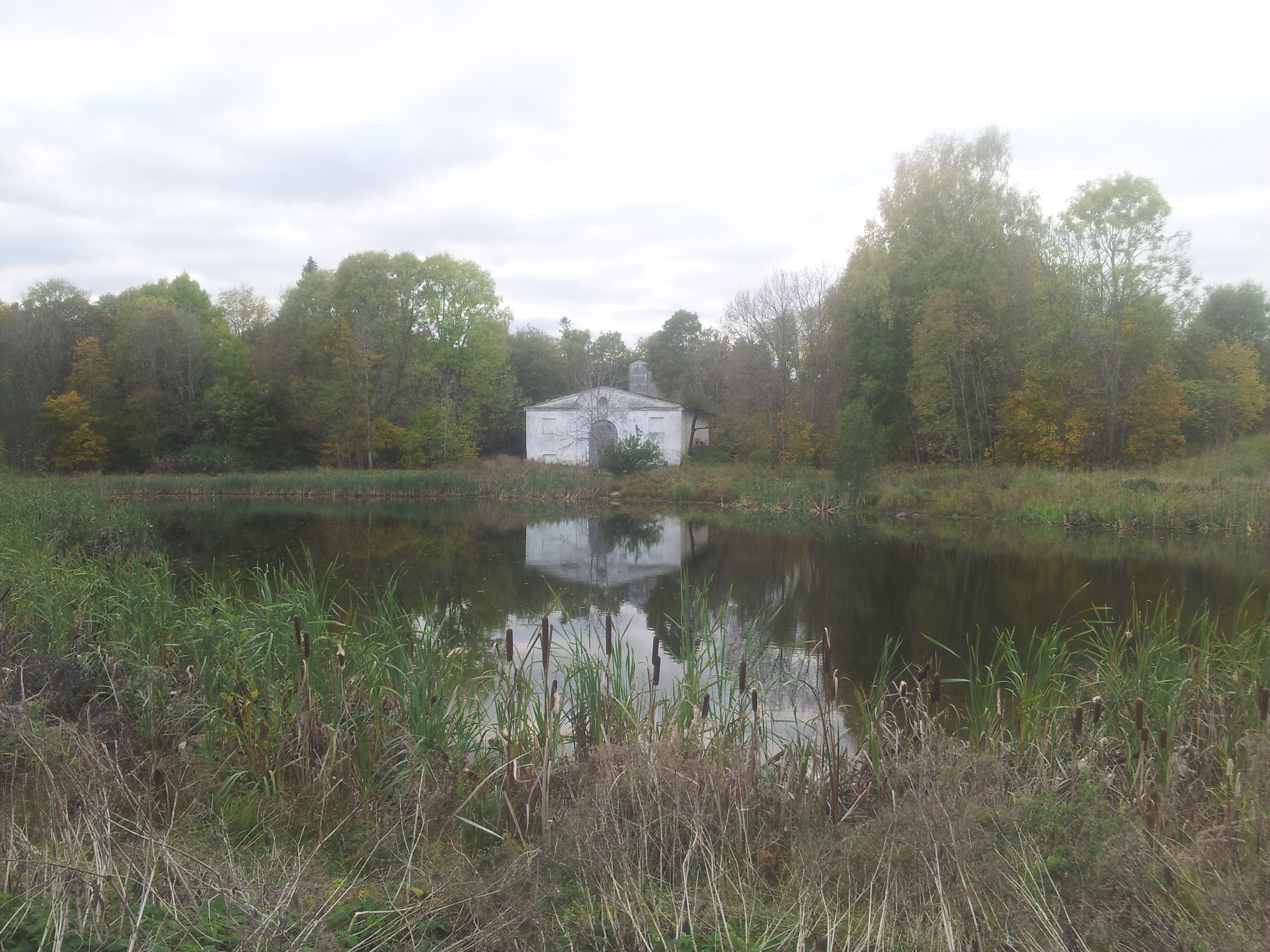 Aaspere mõisa kuivati